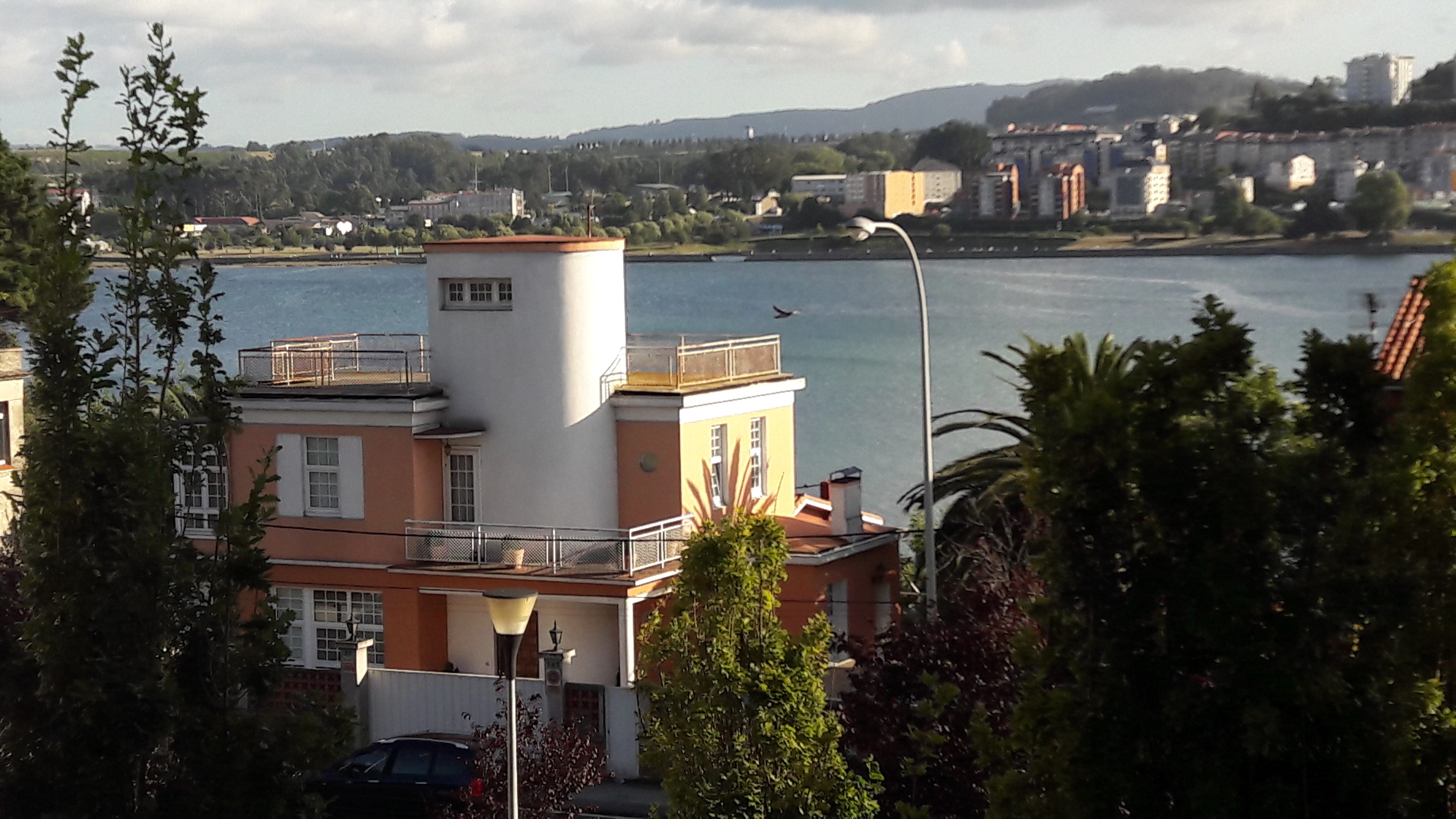 Casa Caramés, de Xosé Caridad Mateo, en Perillo (Oleiros)